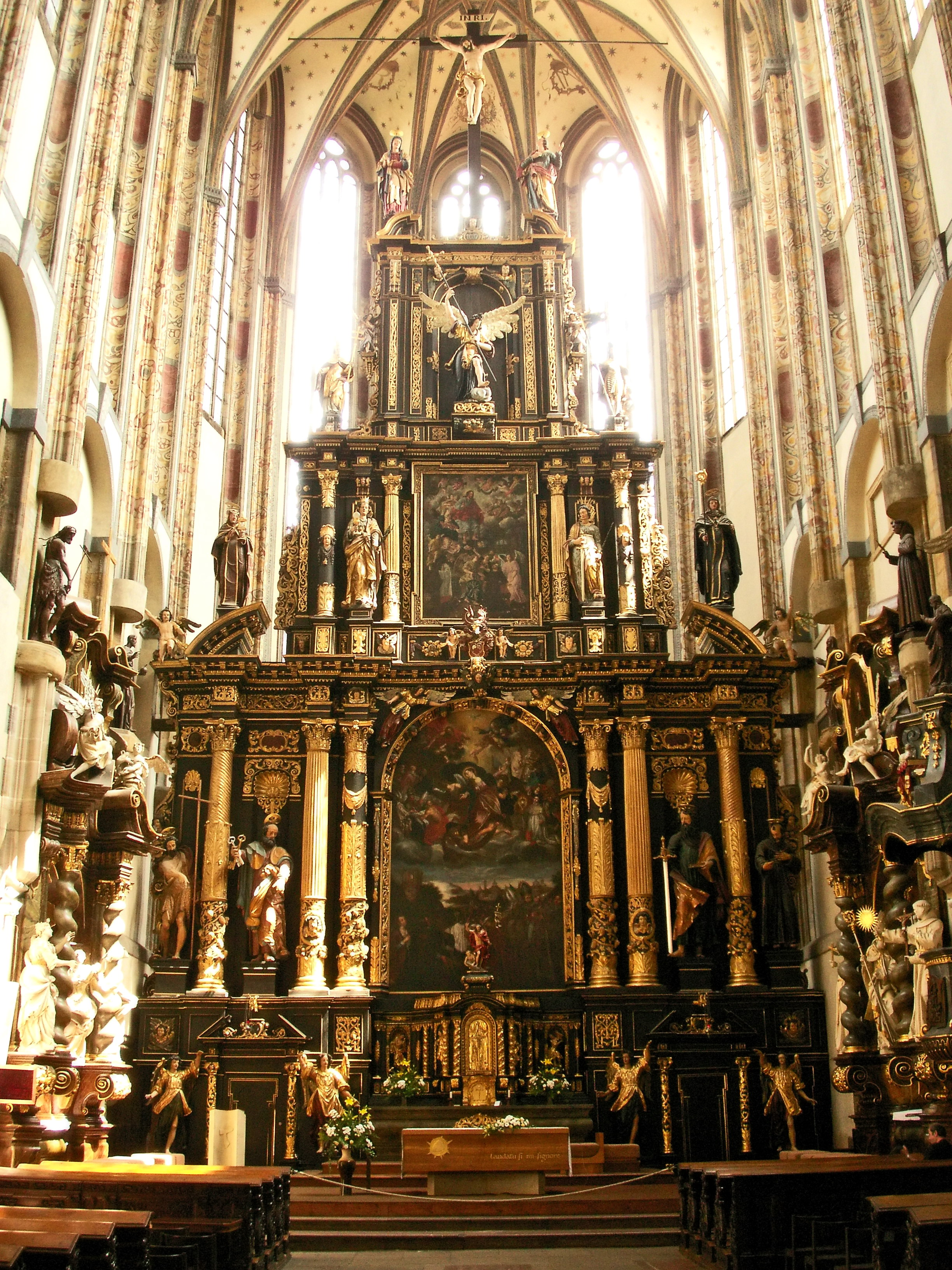 Oltář v chrámu Panny Marie Sněžné v Praze